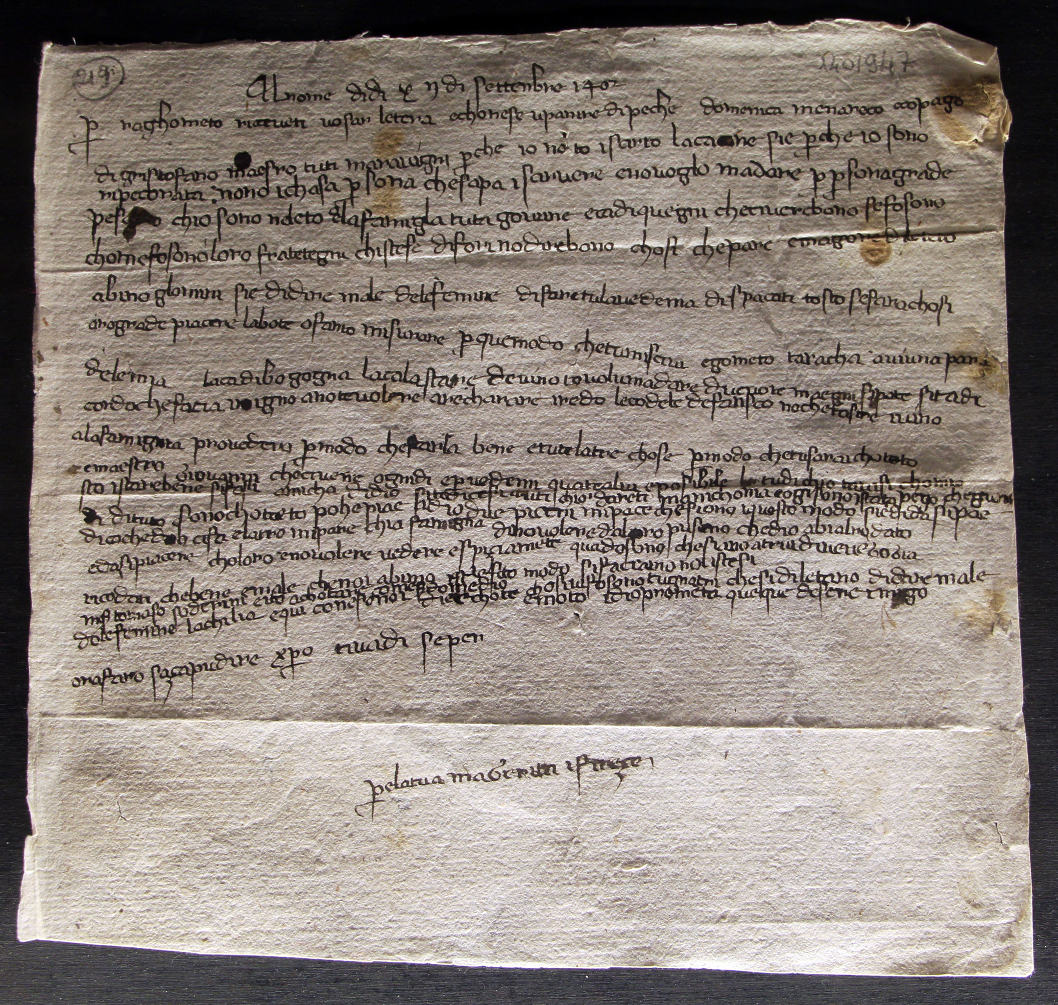 Palazzo Datini - Prato